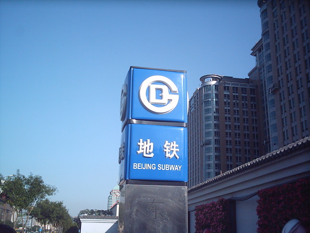 Beijing Underground, Beijing Underground Sign